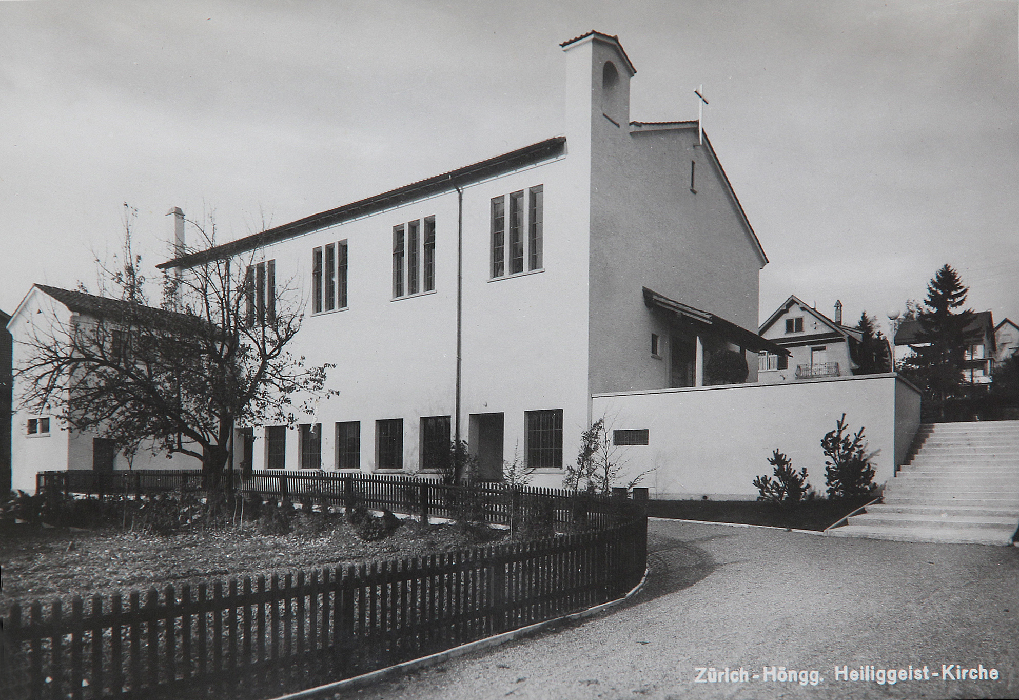 Römisch-katholische Pfarrkirche Heilig Geist von 1940, Ansicht von Südosten